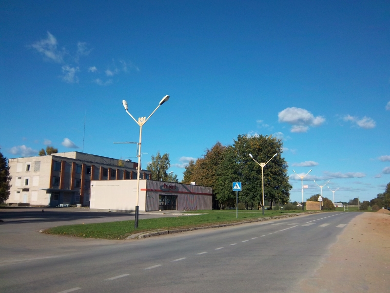 Stasiūnų centras, Kaišiadorių r.